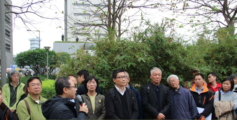 香港佔中三子率眾自首承擔公民抗命罪責